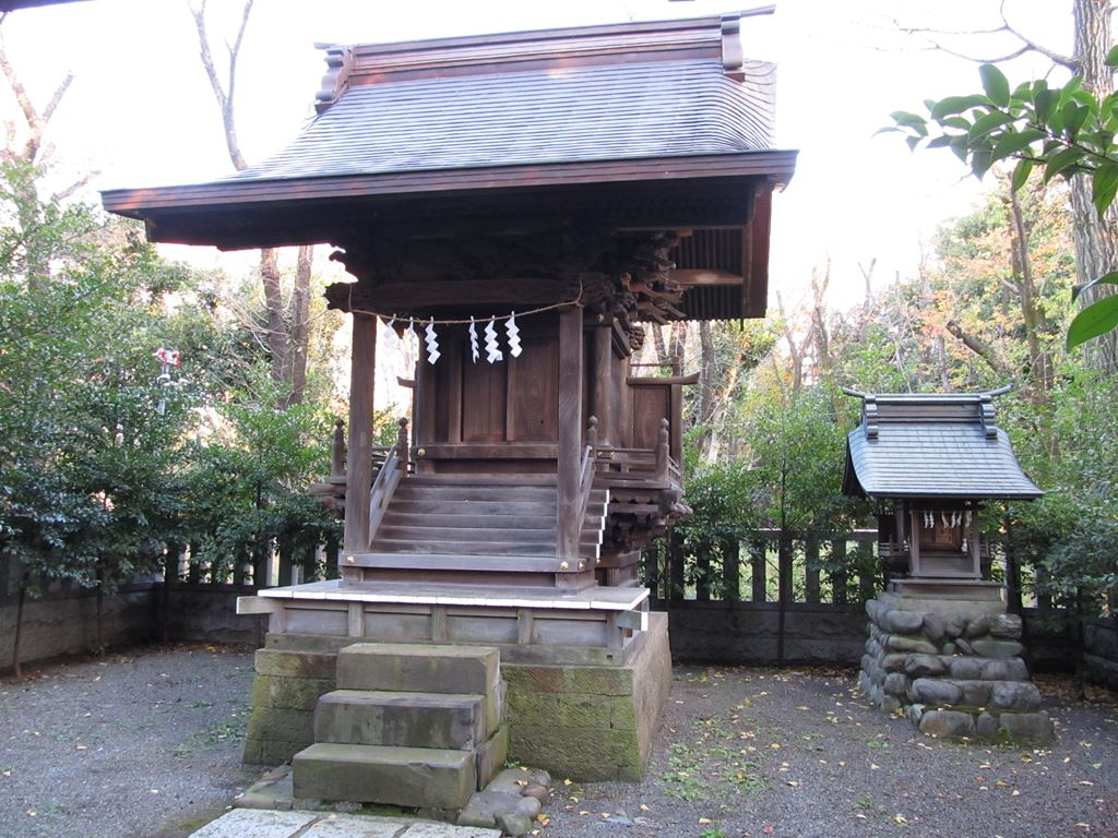 武蔵国八幡神社 東京都府中市